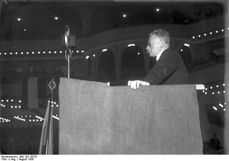 Der Führer der Deutschnationalen Abgeordneter Hugenberg sprach vor Zehntausenden im Sportpalast in Berlin! Der Reichstagsabgeordnete und Führer der Deutschnationalen auf dem Rednerpult im Sportpalast in Berlin.